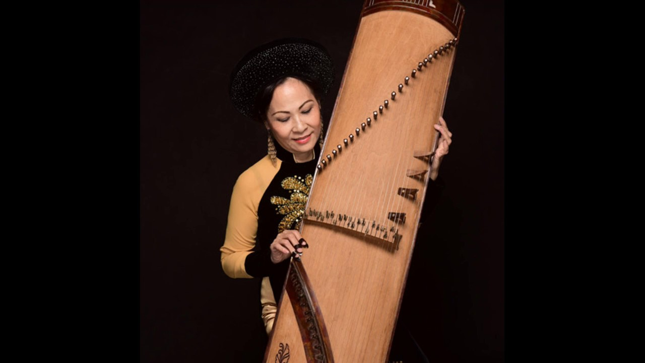 đàn tranh cải tiến Phương Bảo